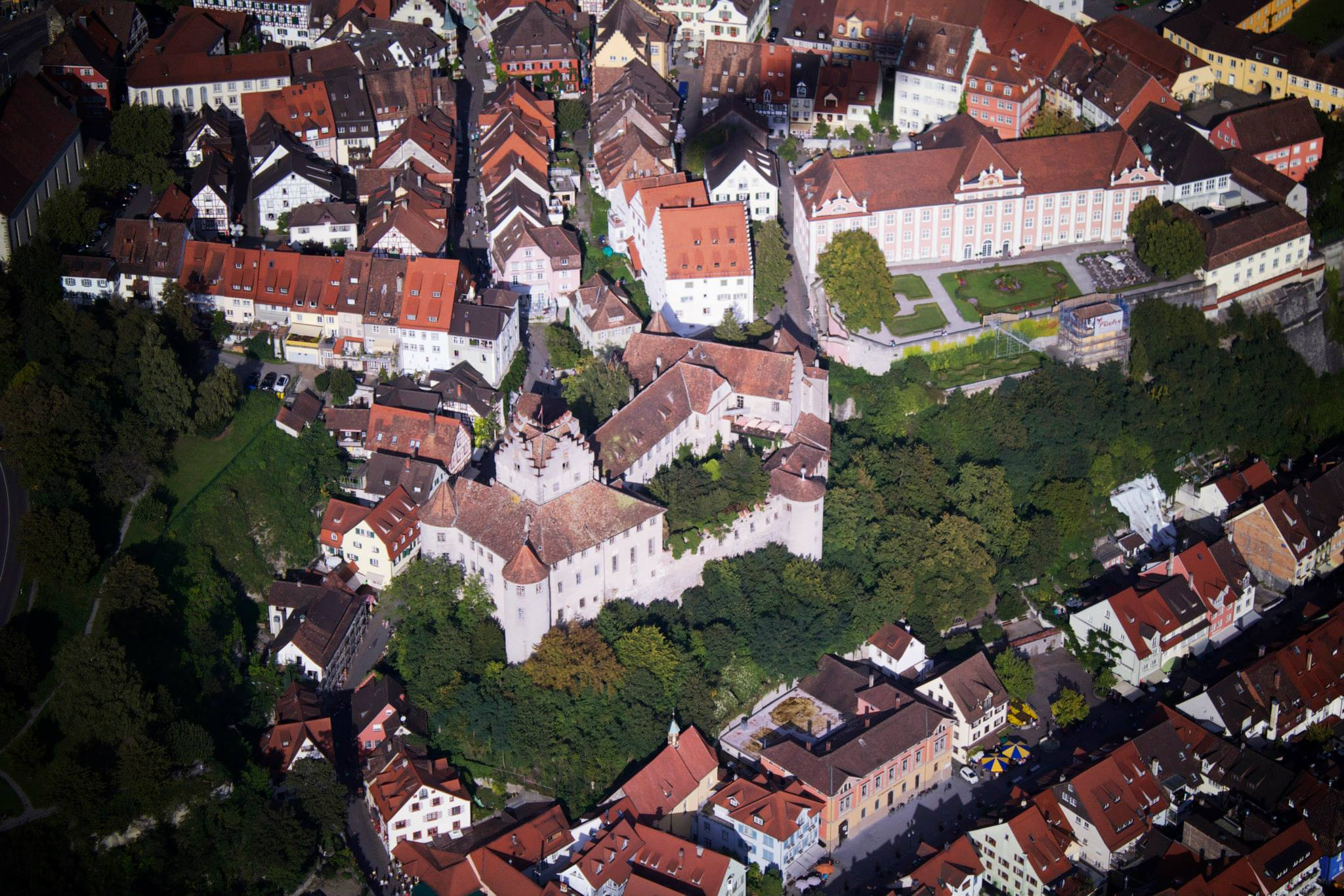 Die Meersburg